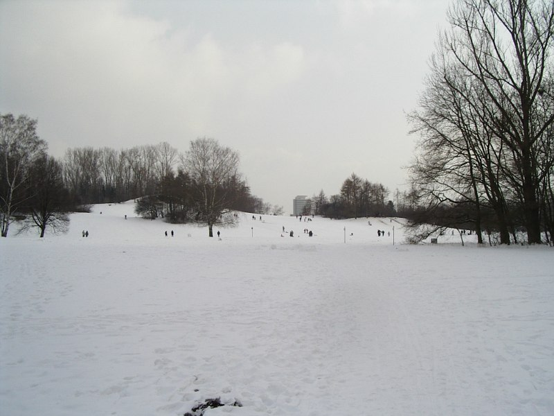 Nuremberg, Marienberg